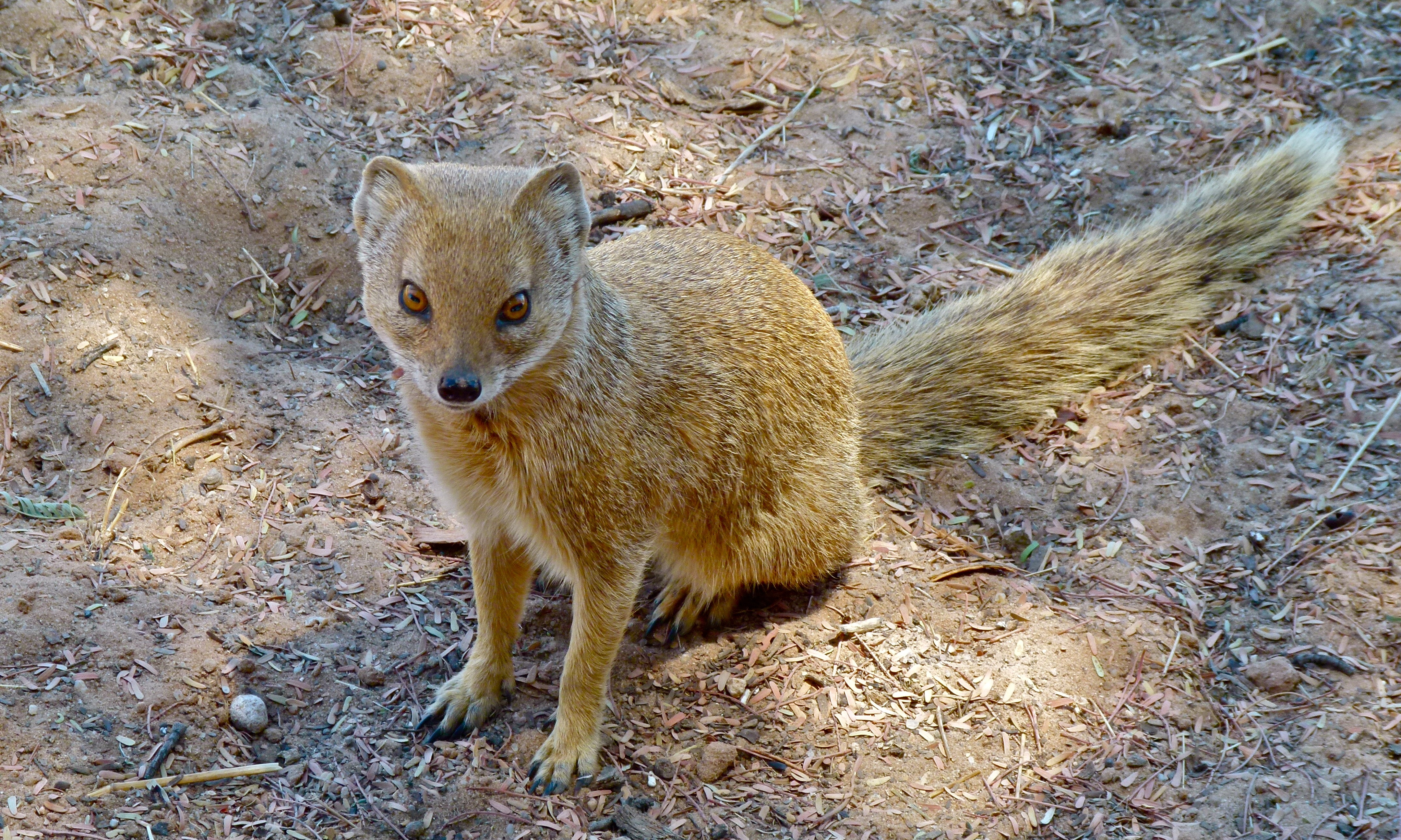 Urikarus Camp, Kgalagadi Transfrontier Park, SOUTH AFRICA